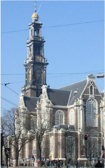 dee versie is geroteerd , zodat de kerk recht staat (en licht uitgesneden, wat na rotatie onvermijdelijk is))